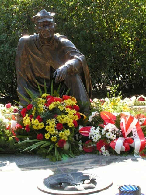 Pomnik Aleksandra Kamińskiego w Łodzi (Poland) Autor zdjęcia:Tomasz Szala mail: autor pomnika: Kazimierz Karpiński, profesor łódzkiej Akademii Sztuk Pięknych